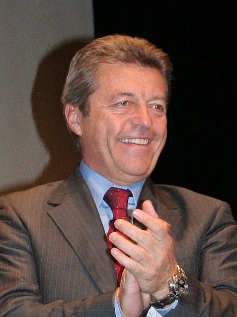 Alain Joyandet au festival de Vesoul